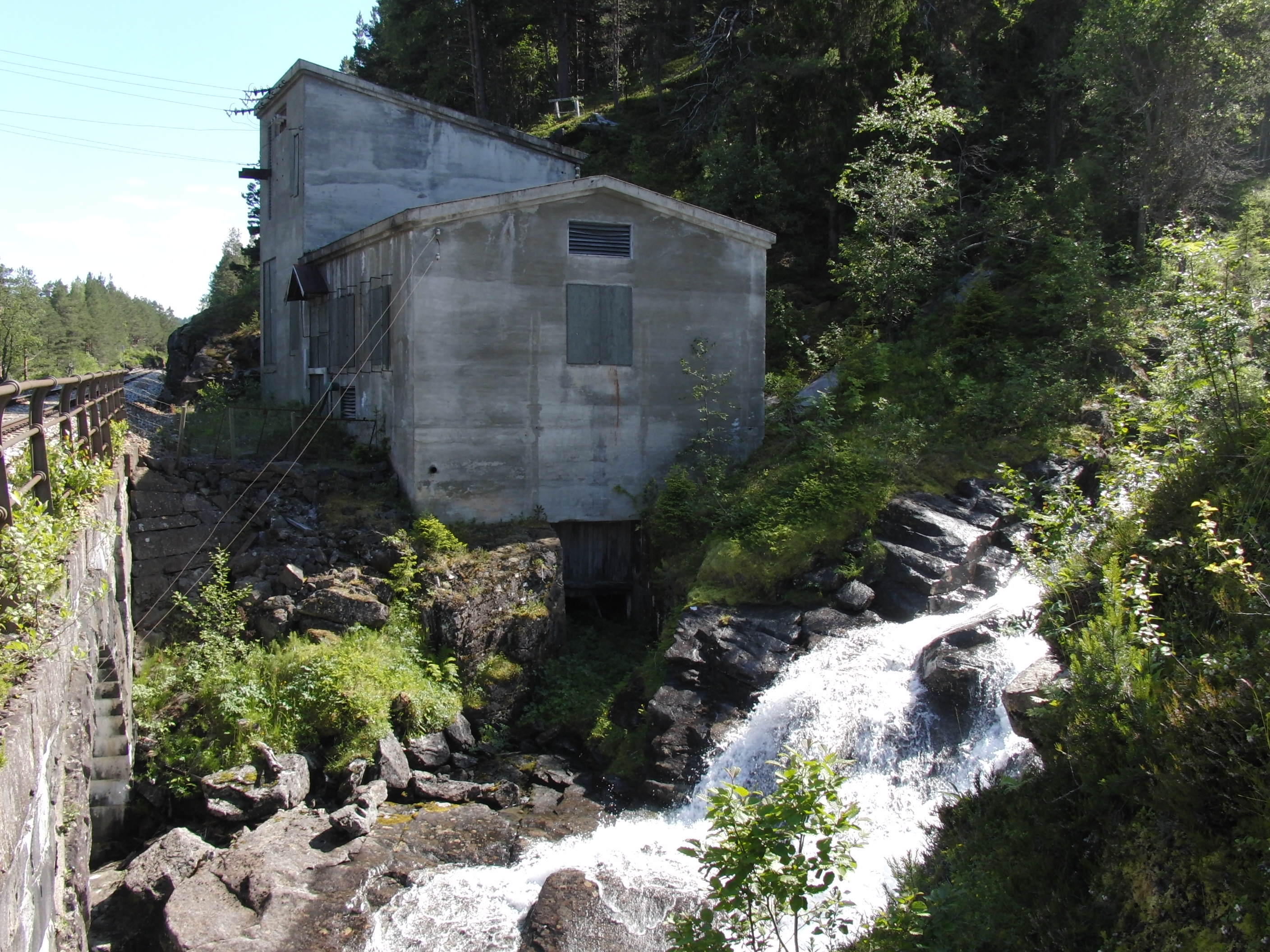 Vermefossen kraftverk, nedlagt